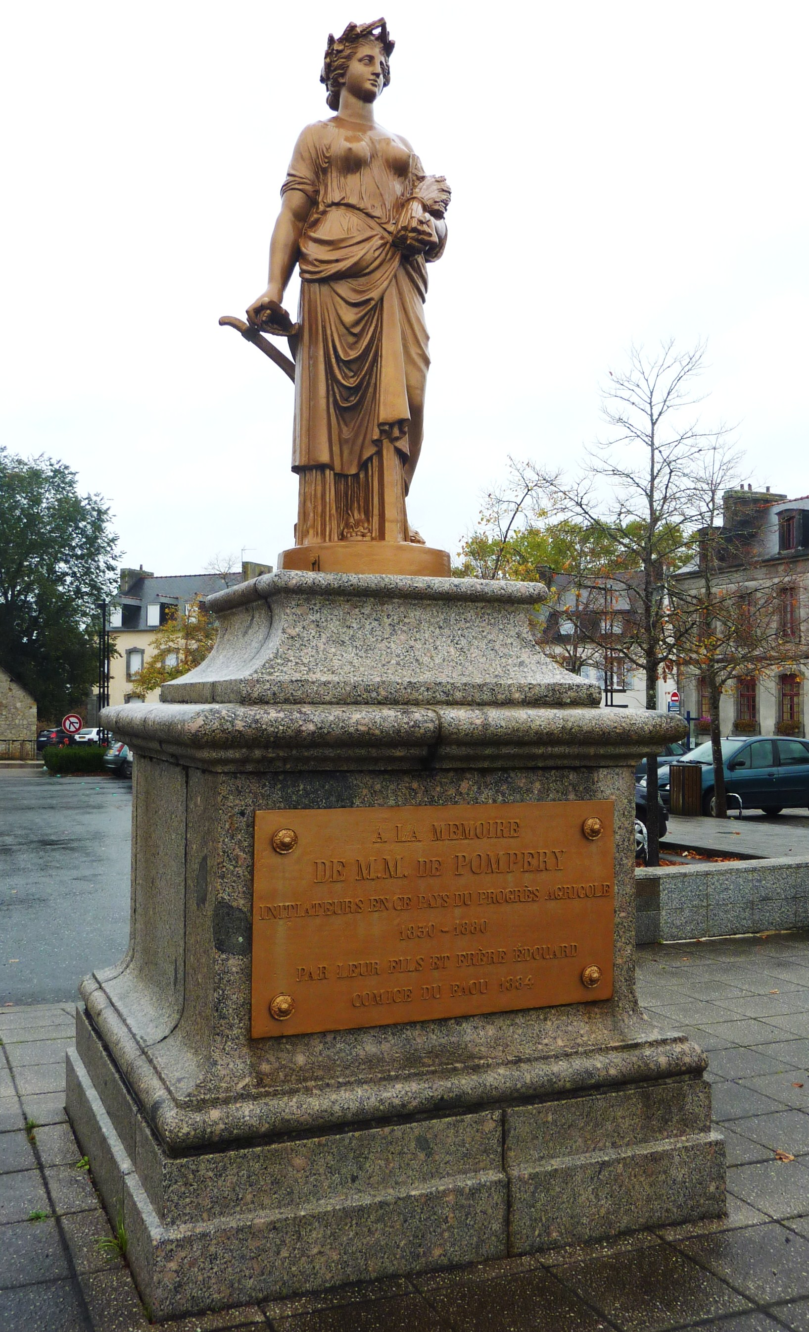 Monument en l'honneur de MM. de Pompery au Faou, statue de Mathurin Moreau - Texte de la plaque : A la mémoire de MM. de Pompéry* initiateurs en ce pays du progrès agricole. 1830-1880. Par leur fils et frère Édouard - Comice du Faou 1884 - * (Louis-Charles, son père , Théophile et Henry, ses frères)